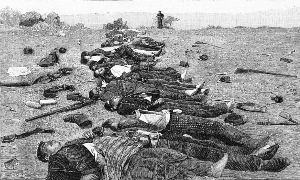 Después de la Batalla de Placilla, durante la Guerra Civil chilena de 1891. Al fondo un capellán.